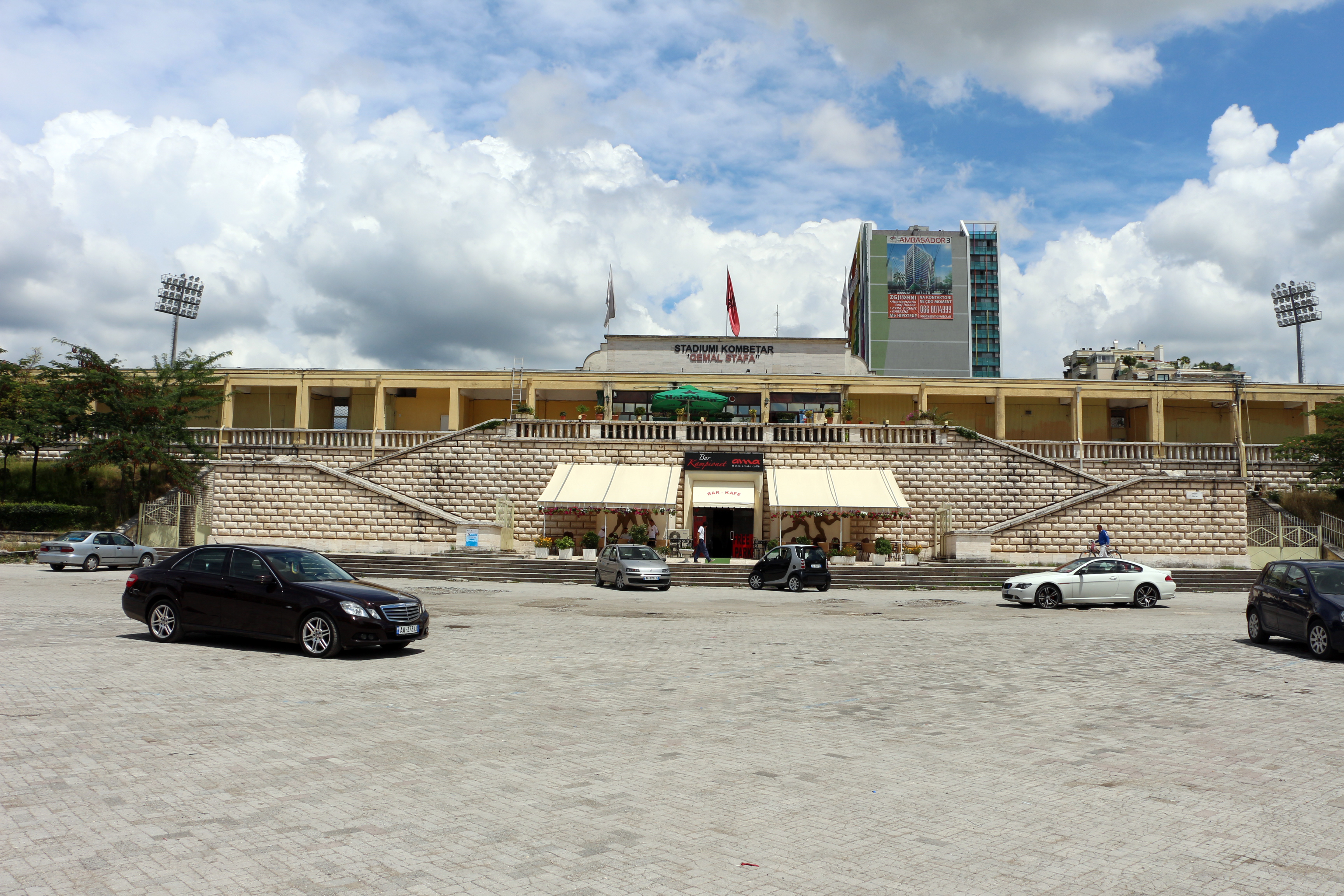 Stadiumi Kombëtar " Qemal Stafa"